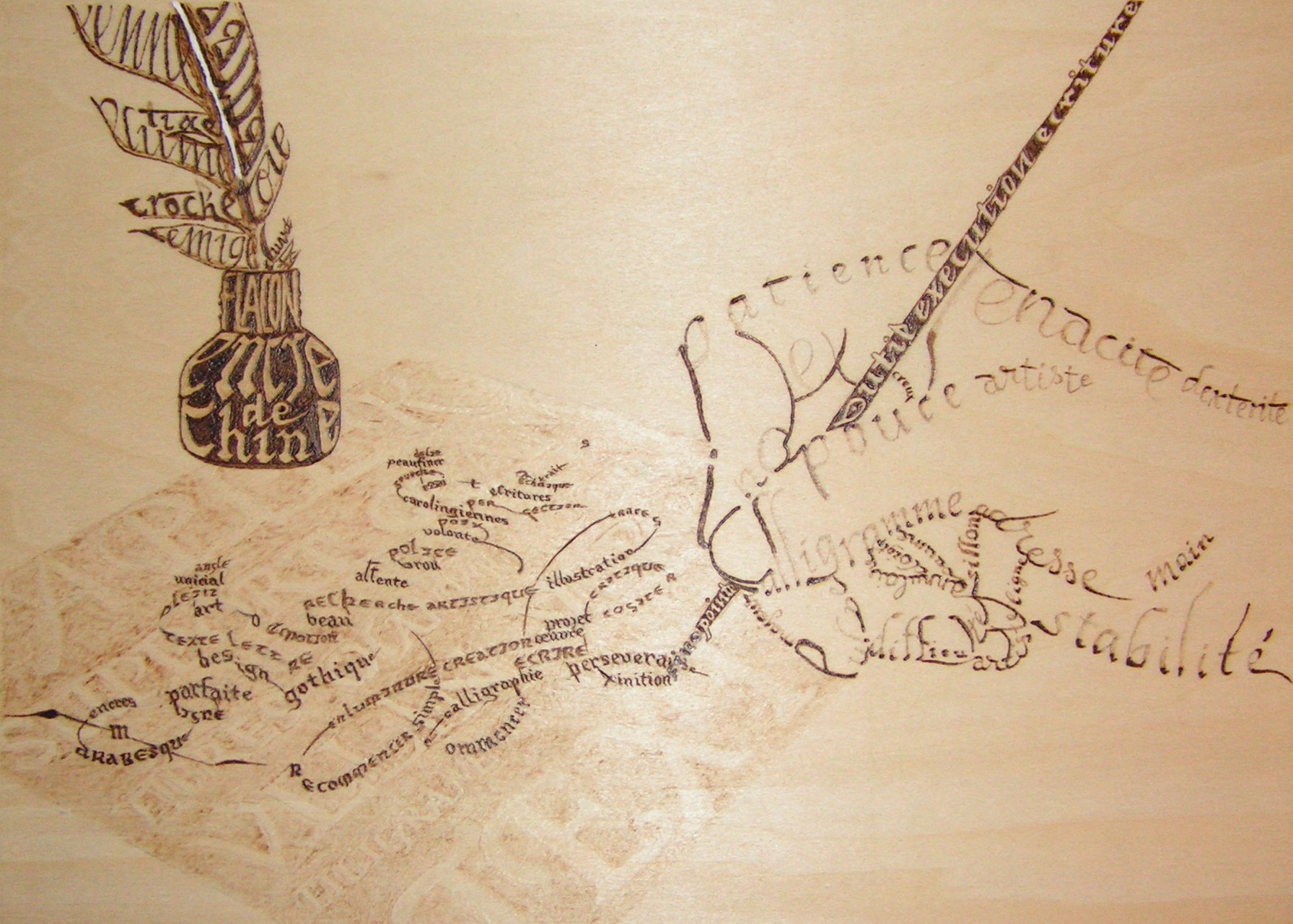 Calligramme réalisé sur du contre-plaqué japonais par pyrogravure.